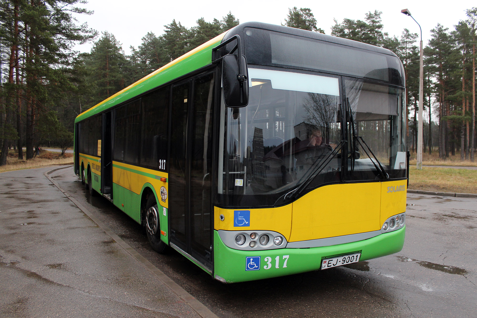 12. autobuss gala pieturā "Križi"